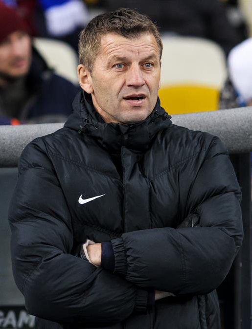 Динамо - Партизан 4:1. Команда Александра Хацкевича без проблем обыграла Партизан и выиграла свою группу (4:1)